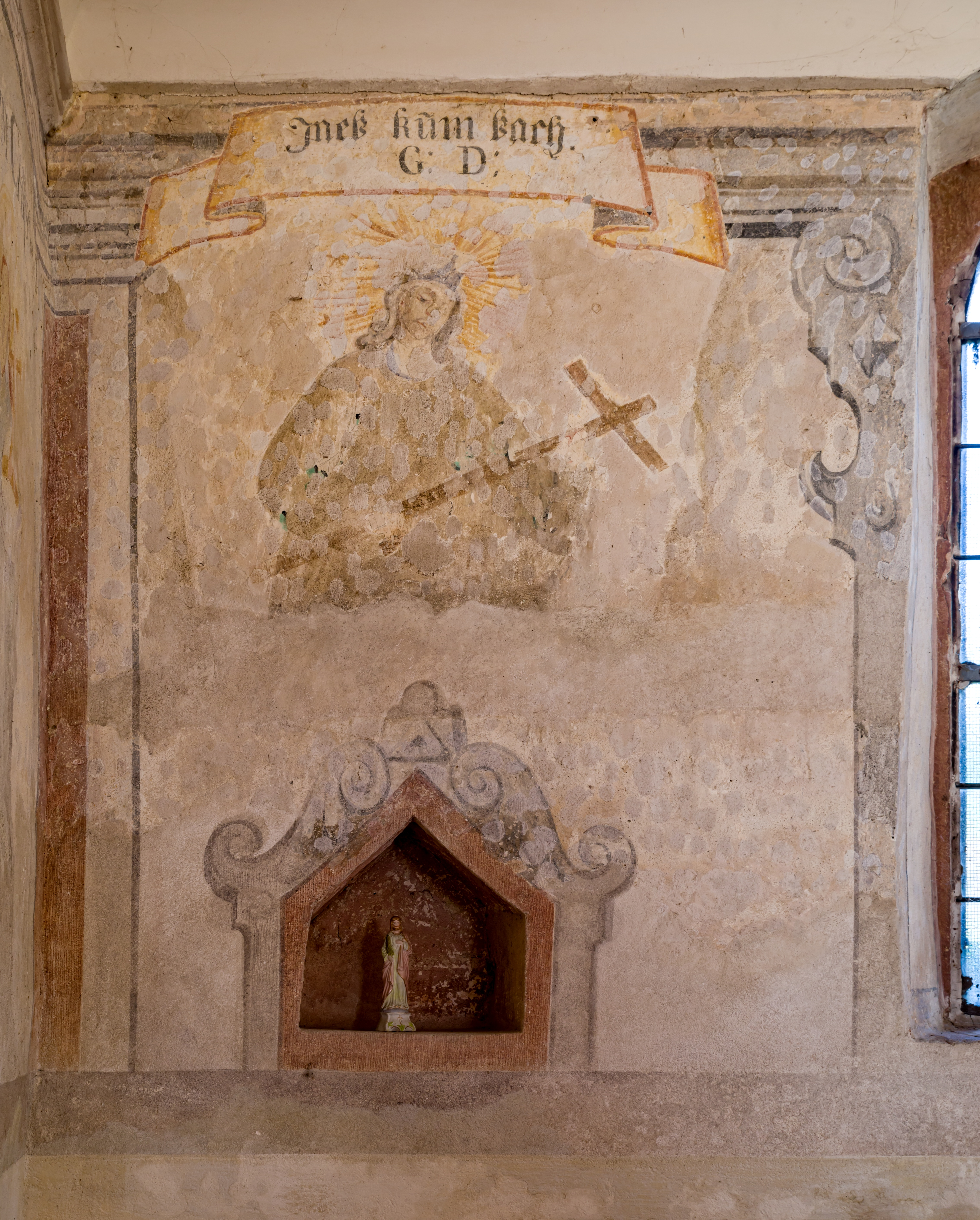 Bilder aus Staufen im Breisgau, die St. Magdalenenkapelle